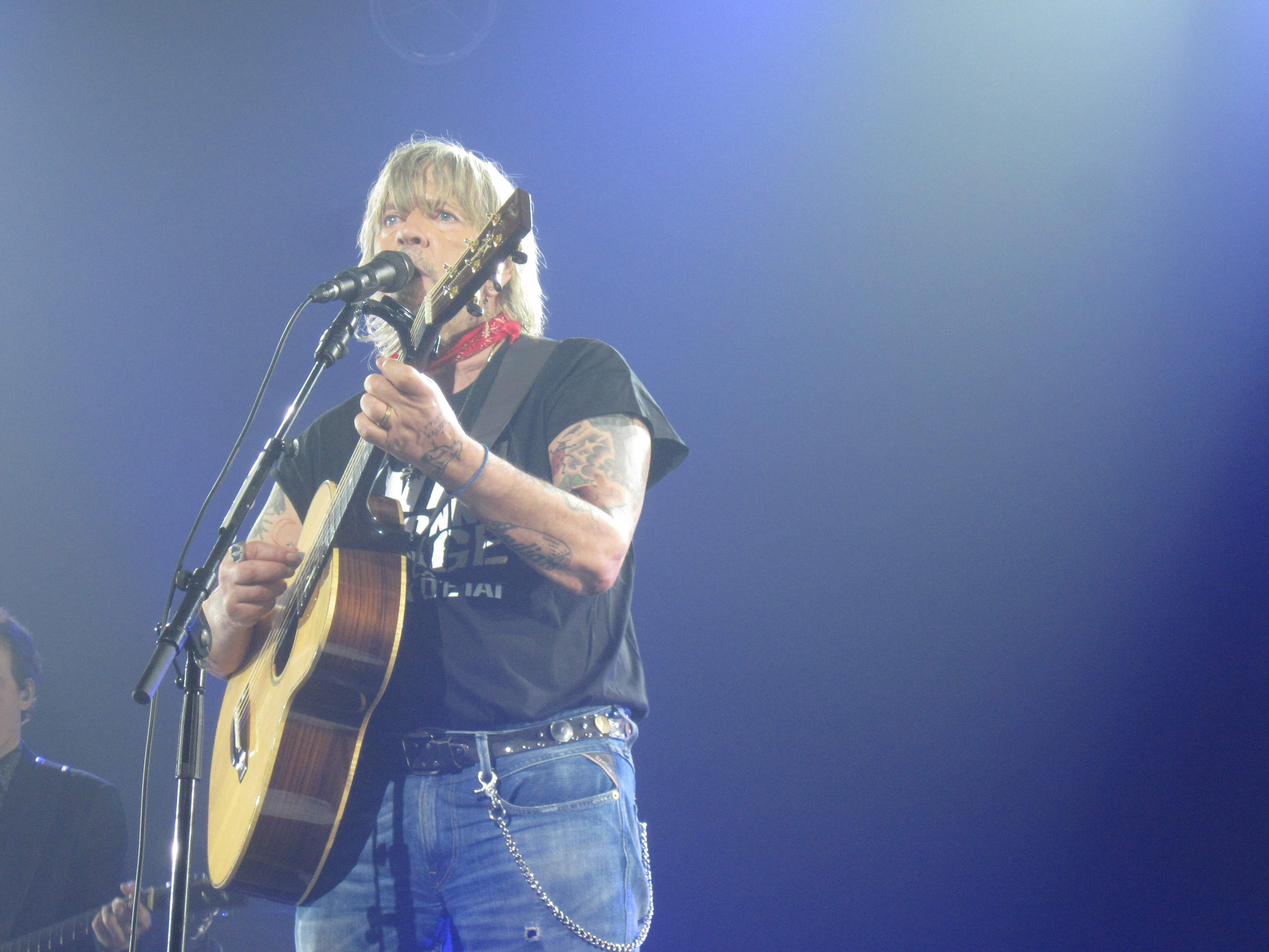 Renaud en concert au Zénith de Paris.